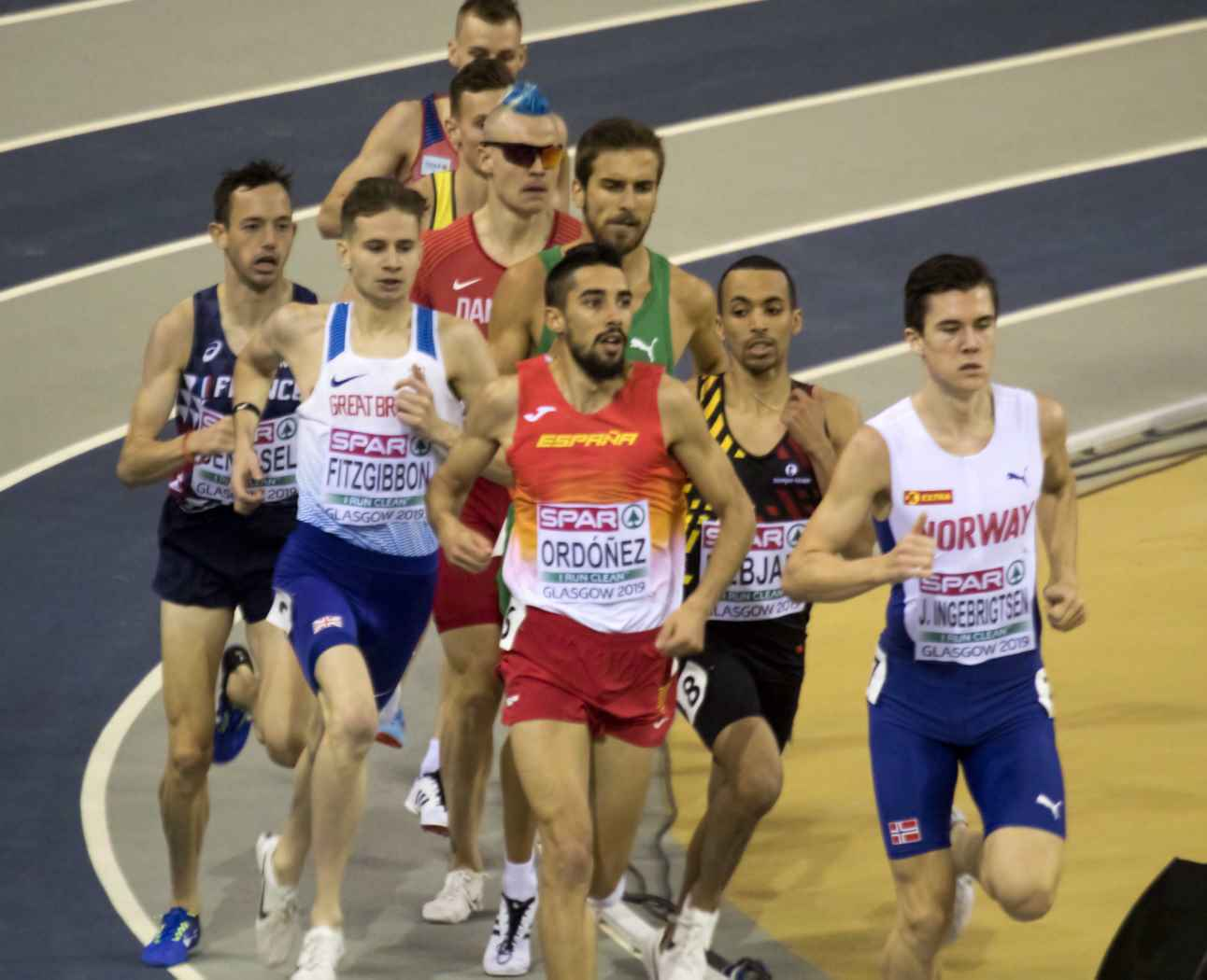 EKI10183 1500m peloton debjani